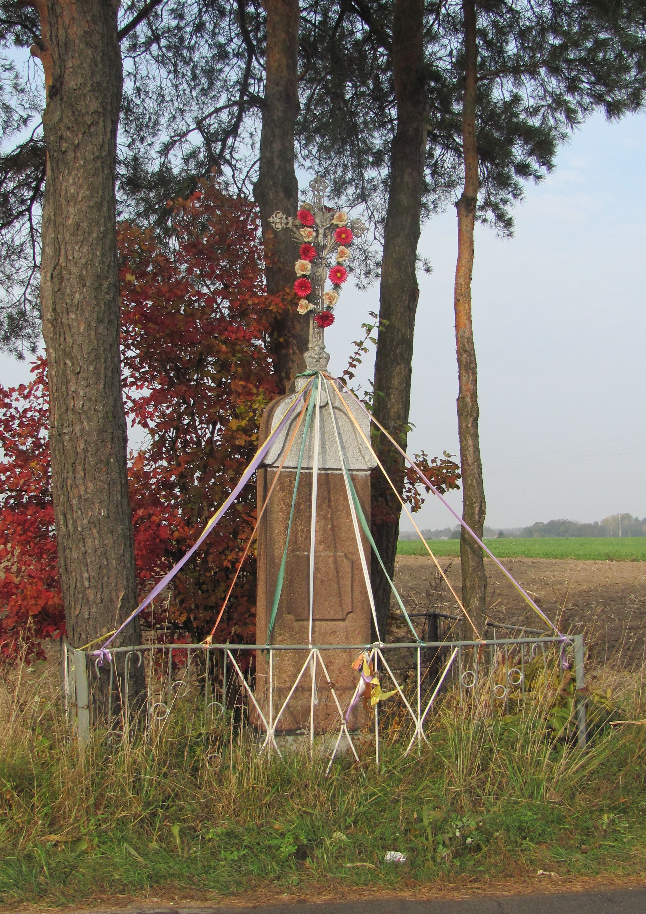 Krzyż przydrożny.